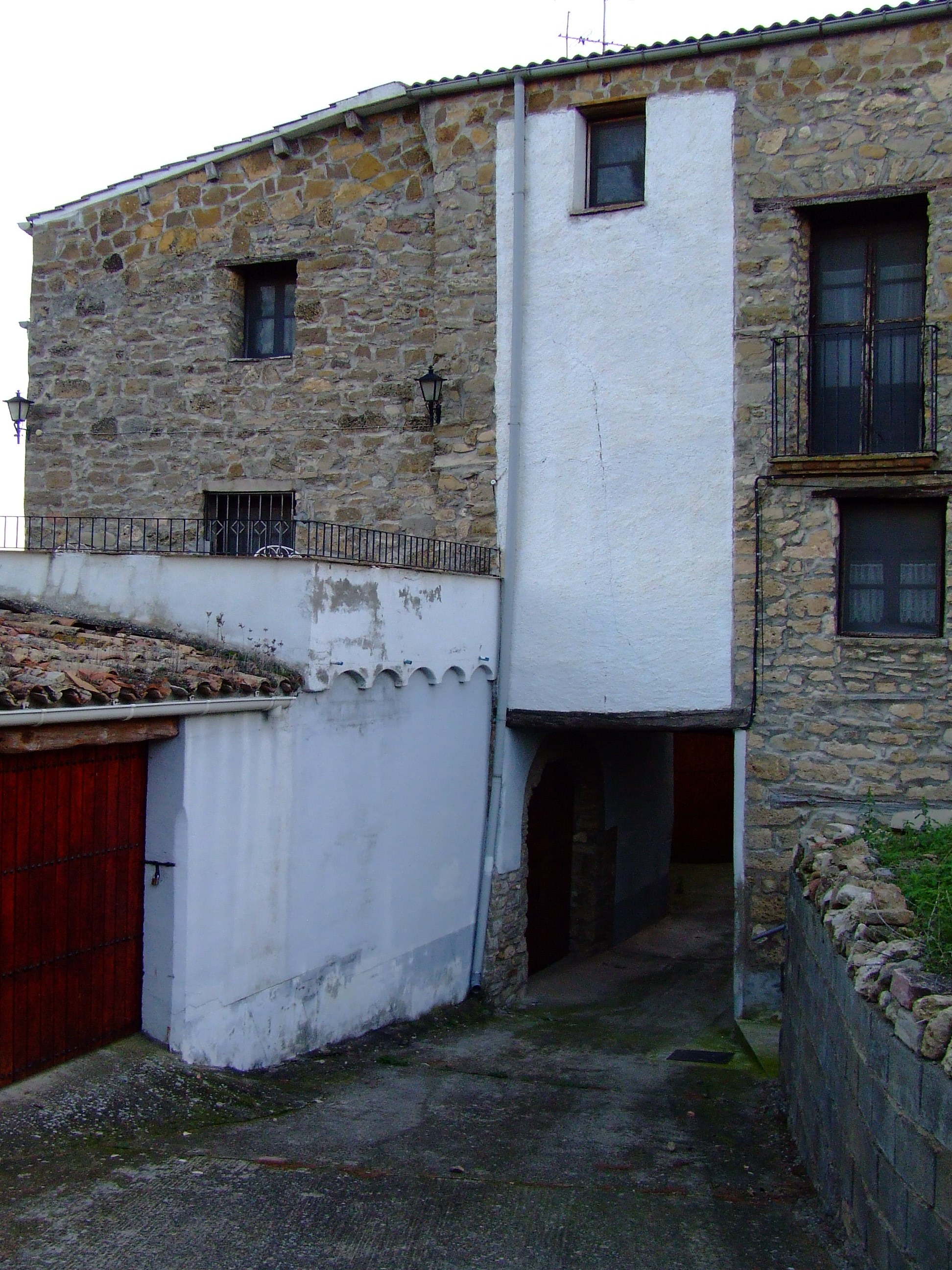 Restes del recinte murat de Sant Romà d'Abella (Isona i Conca Dellà, Pallars Jussà)